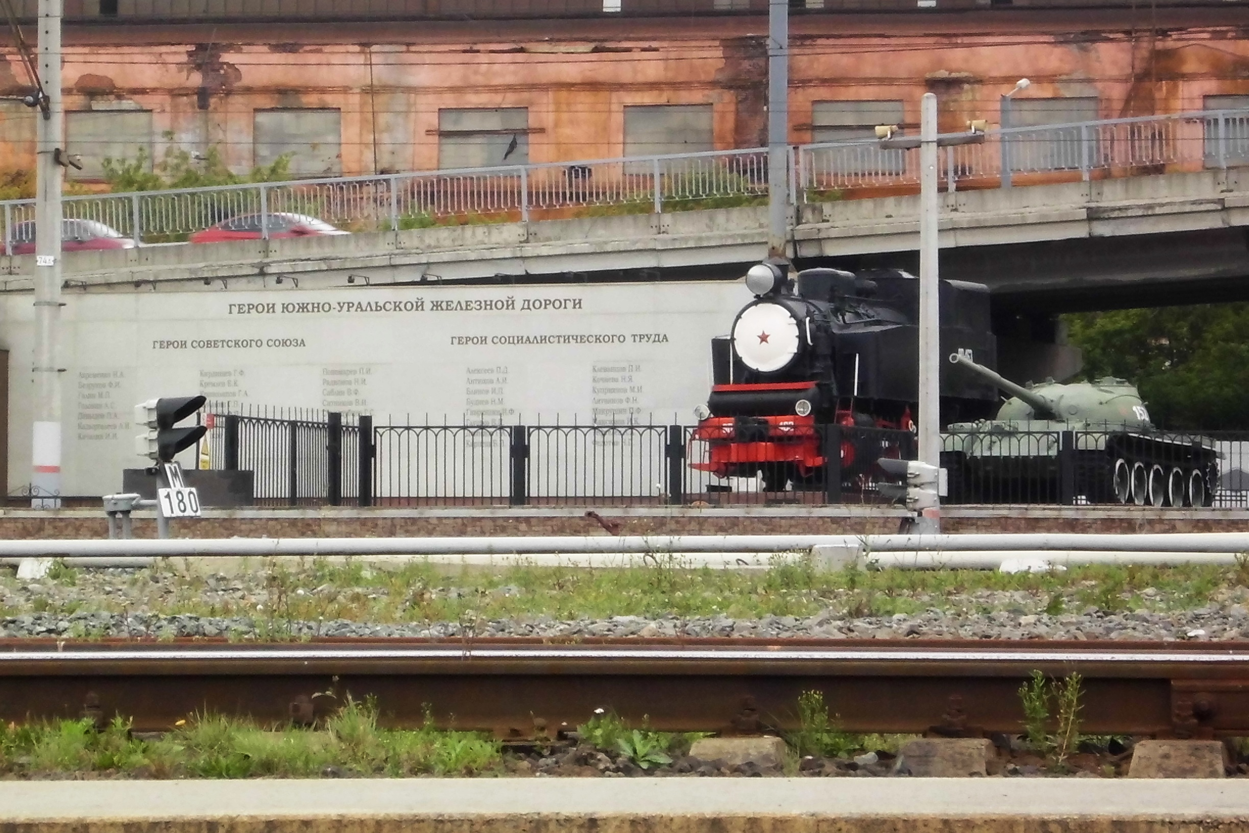 Музей железнодорожной техники ЮУЖД в Челябинске. Экспонаты перед входом: танк-паровоз 9П и танк Т-62.